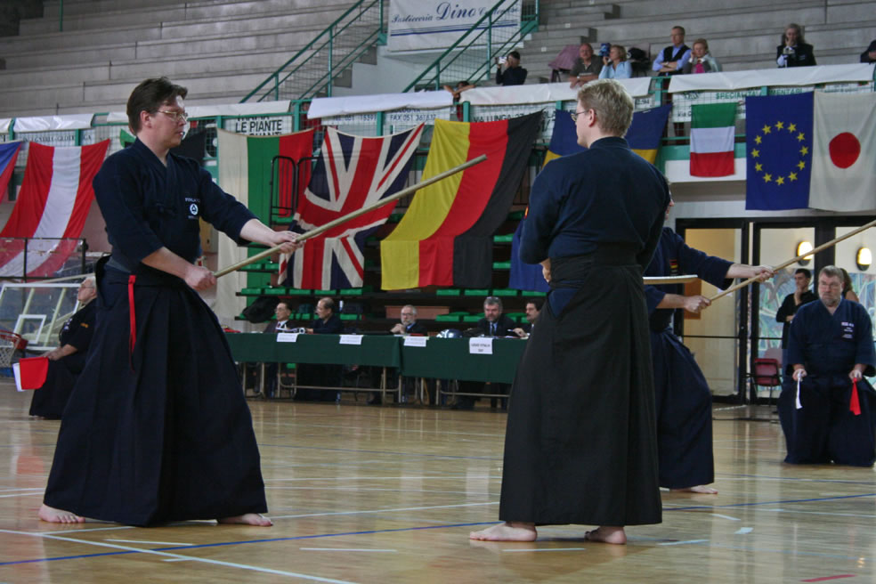 Honte no kamae in jodo, Place EC-jodo shiai Bologna-2005, jodon honte no kamae jodon EM-kisoissa Bolognassa 2005